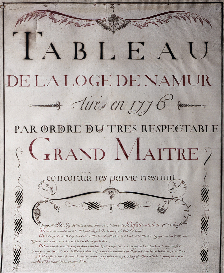 Extrait d'un Tableau de la Parfaite Union (Namur, 1776)